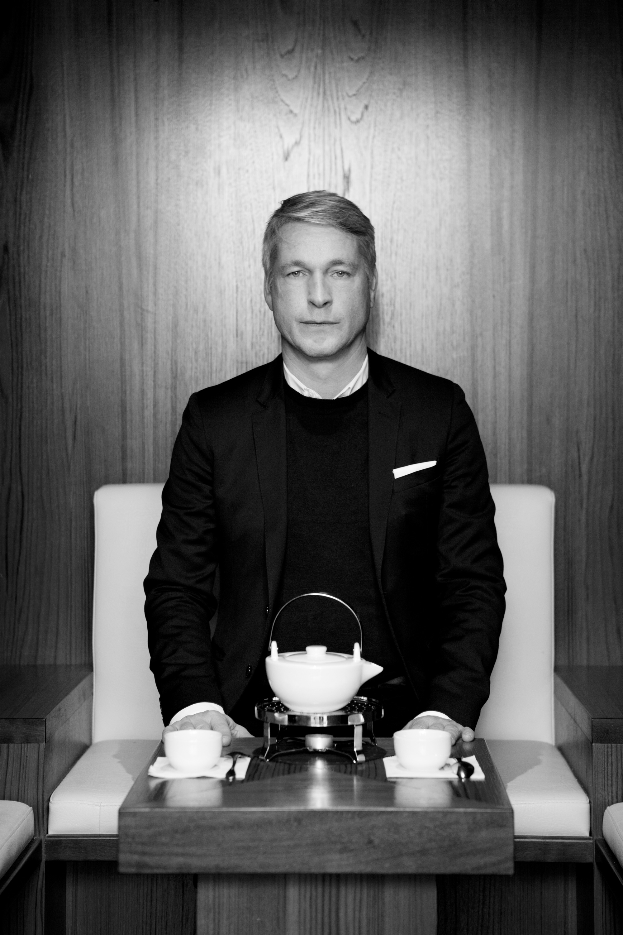 Portrait Bild Marco Spitzar 2017